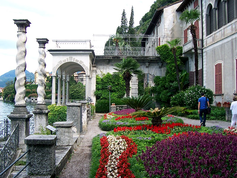 Varenna - Giardini di Villa Monastero